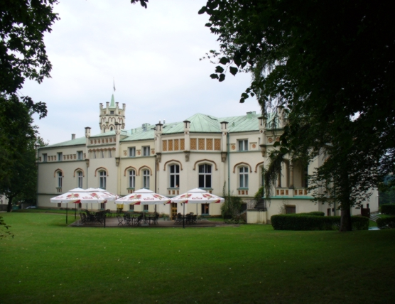 Pałac w Paszkówce